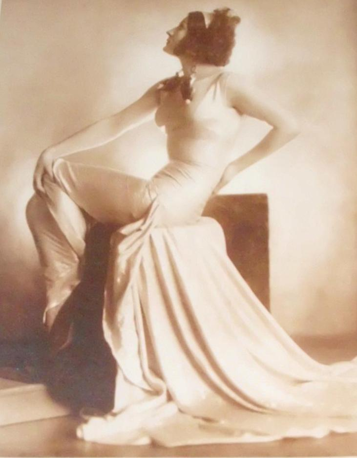 Невенка Урбанова као Госпођица Алварес у представи „Оно што се зове љубав“, Народно позориште